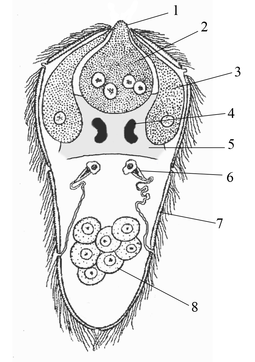 picture of trematode larva - miracidium